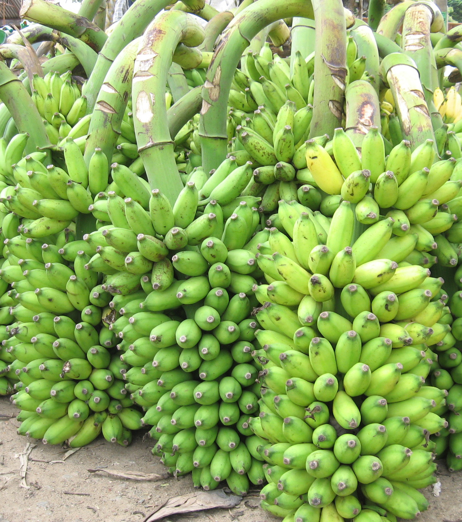 இந்திய மாநிலமான தமிழ்நாட்டின் காயாக இருக்கம் வாழைத்தார்கள்